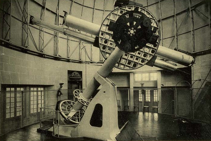 L'ancienne configuration à la coupole de la Table Equatoriale de l'Observatoire de Meudon avec la lunette de 32cm et le coronographe de Lyot